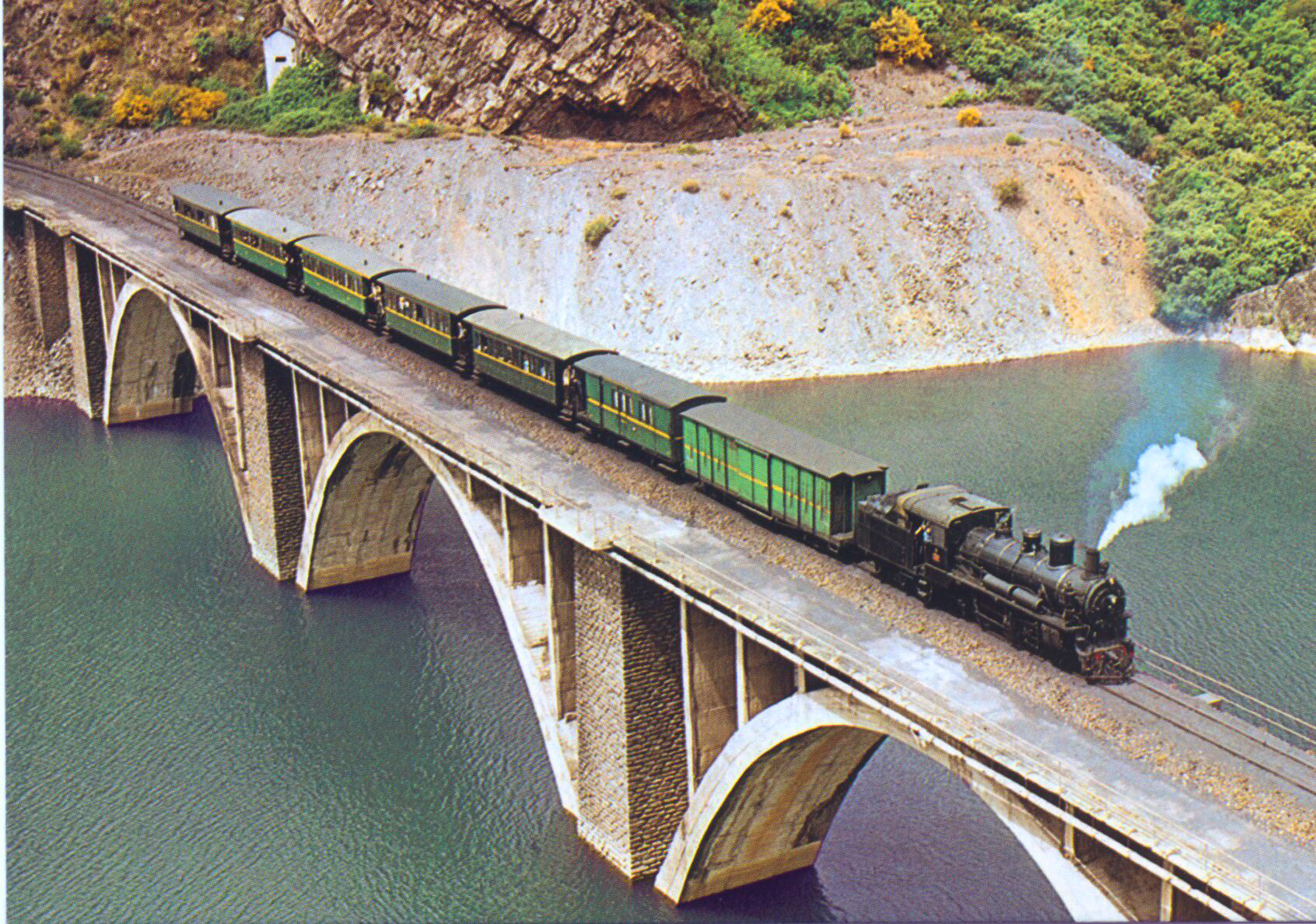 ponferrada a villablino on viaduct